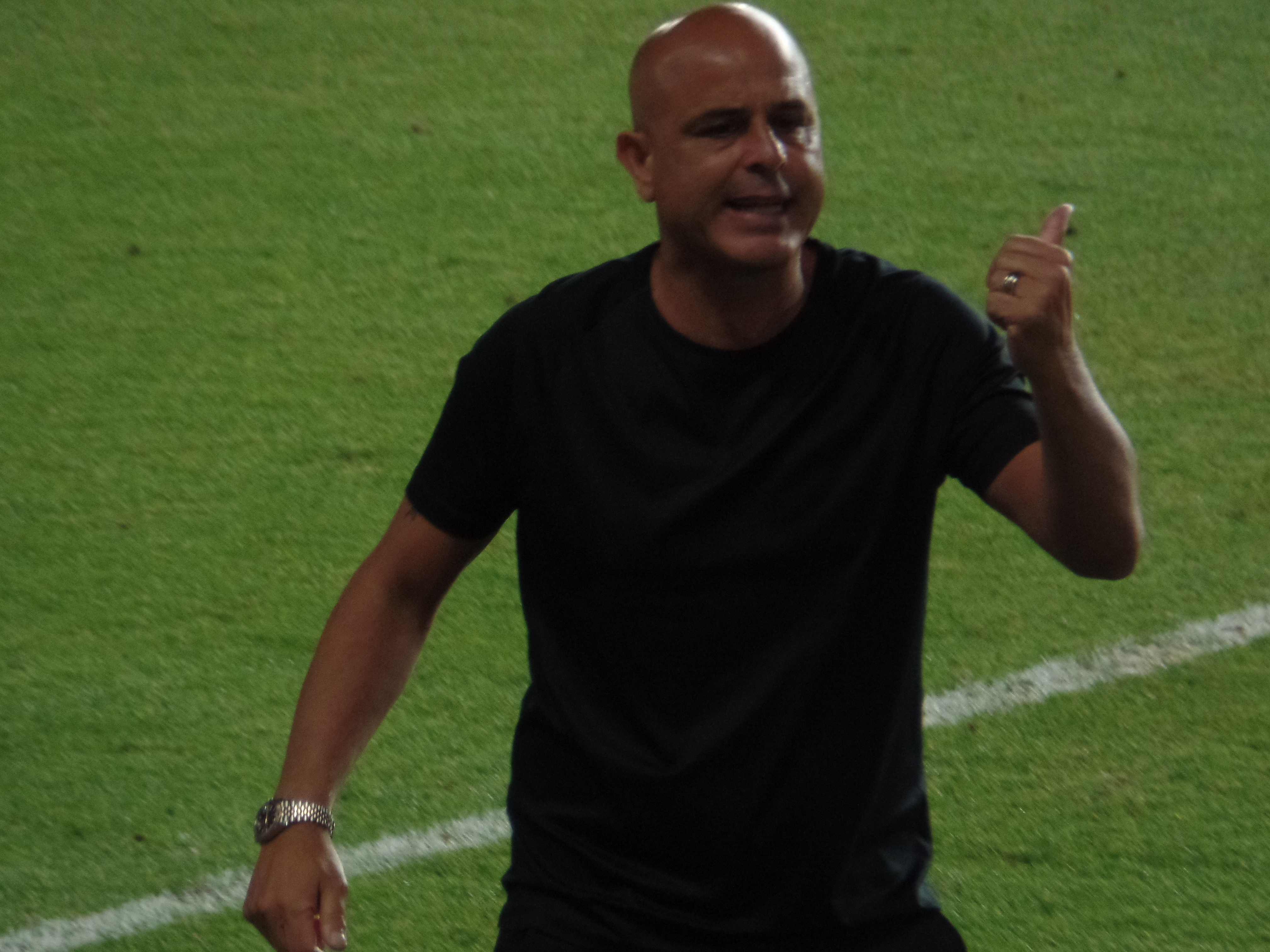 יוסי אבוקסיס על הקווים